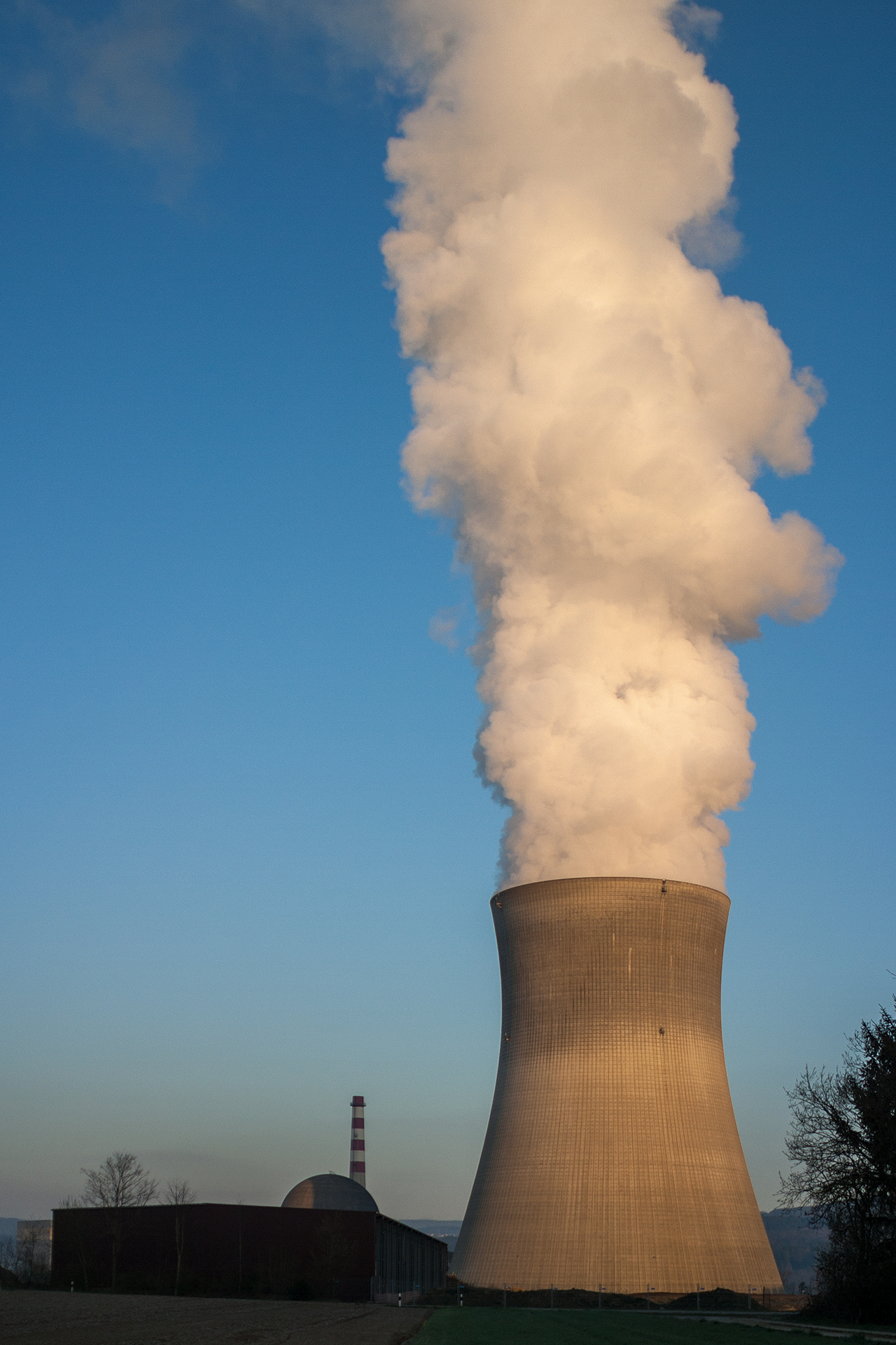 Kühlturm des Kernkraftwerks Leibstadt (AG)